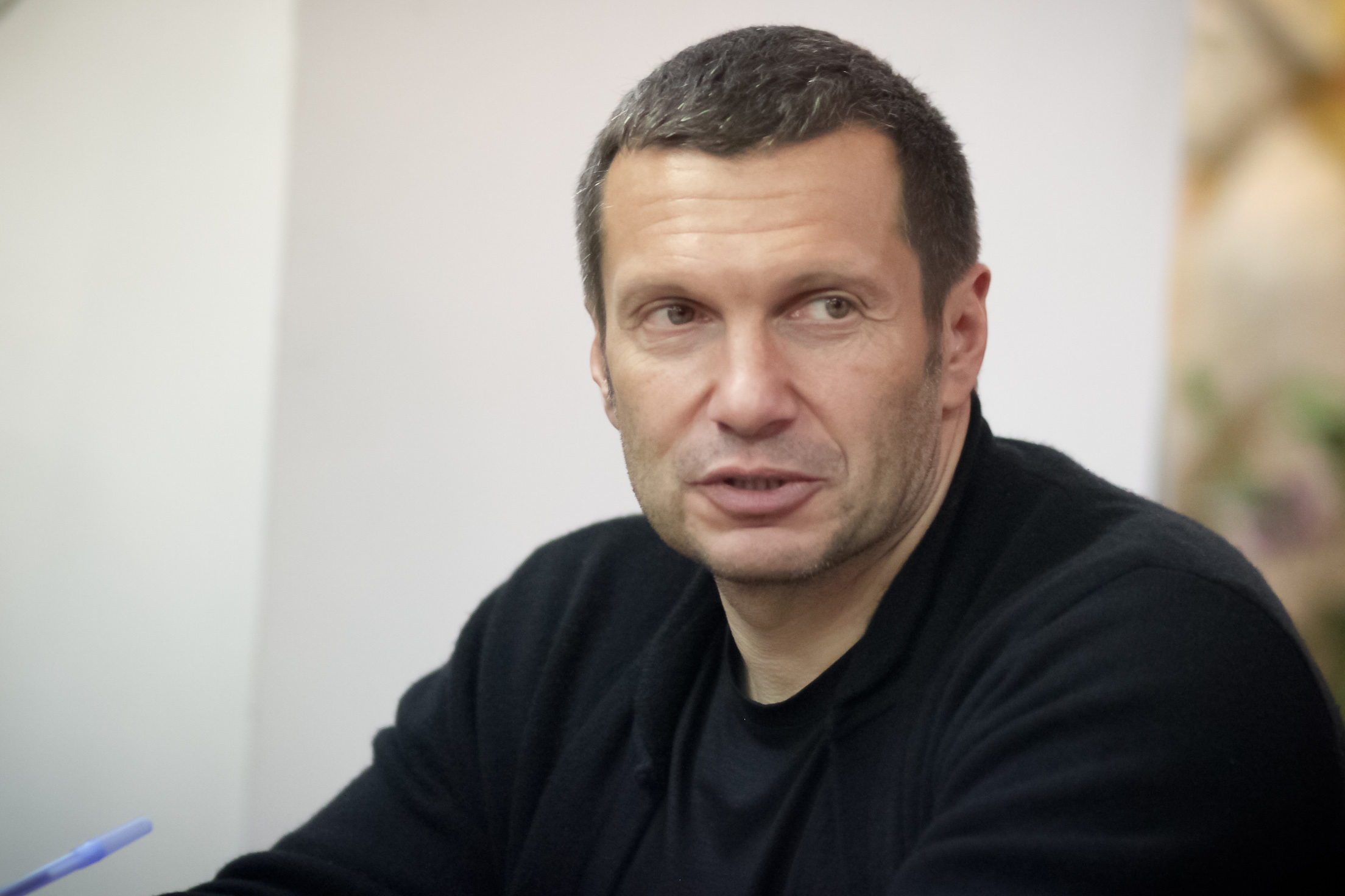 Владимир Соловьев